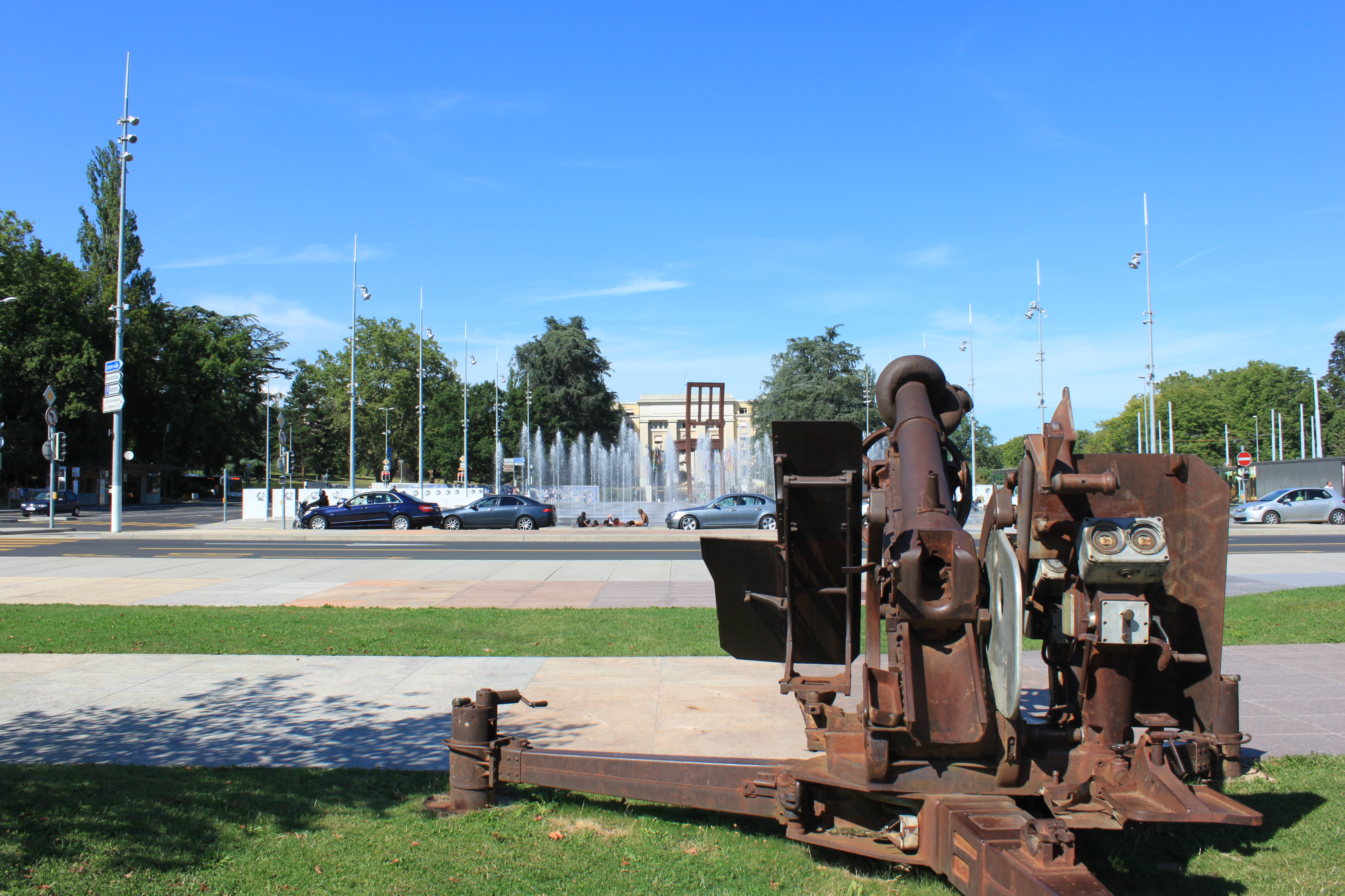 Frieden Uploader’s description